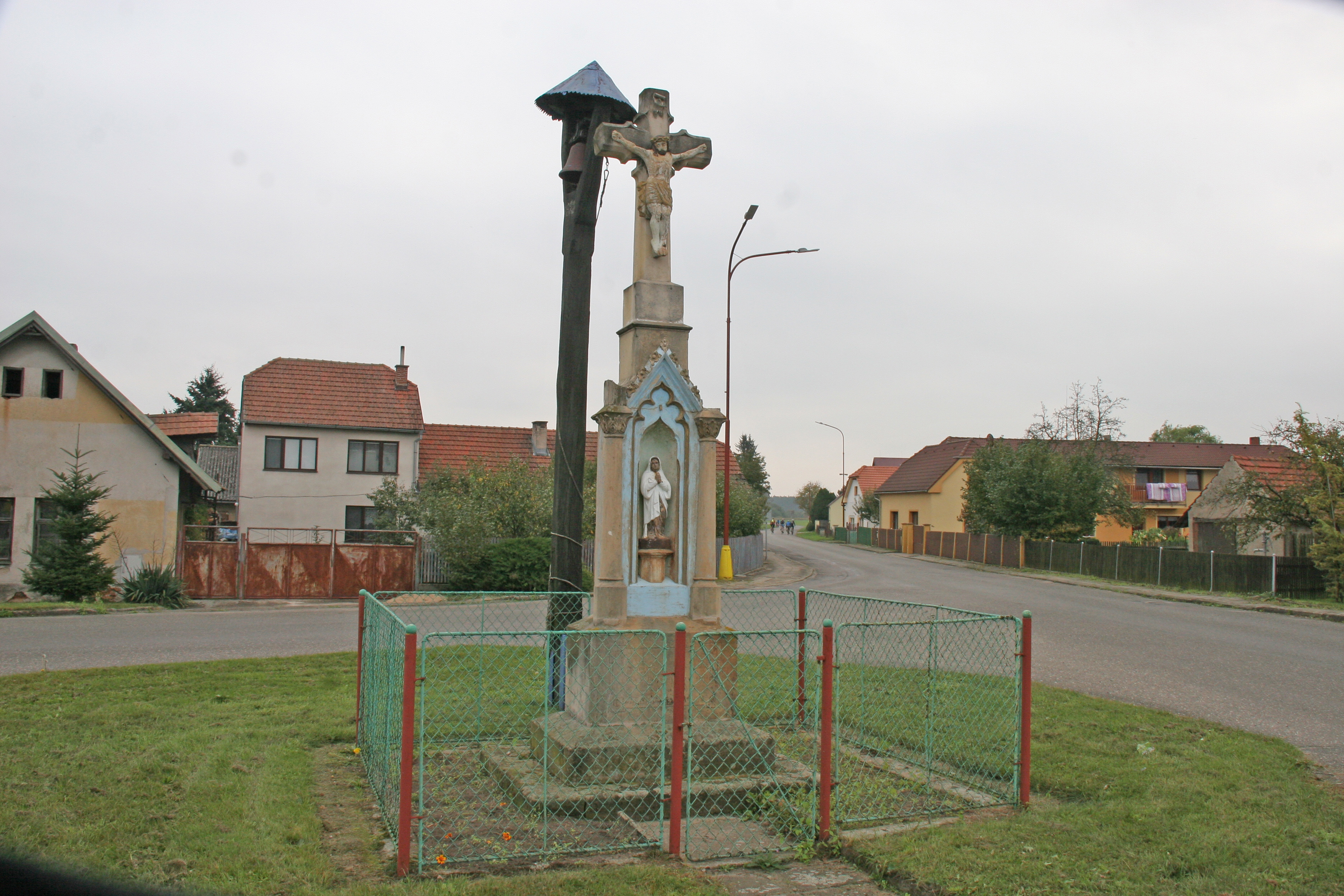 Tetov kříž